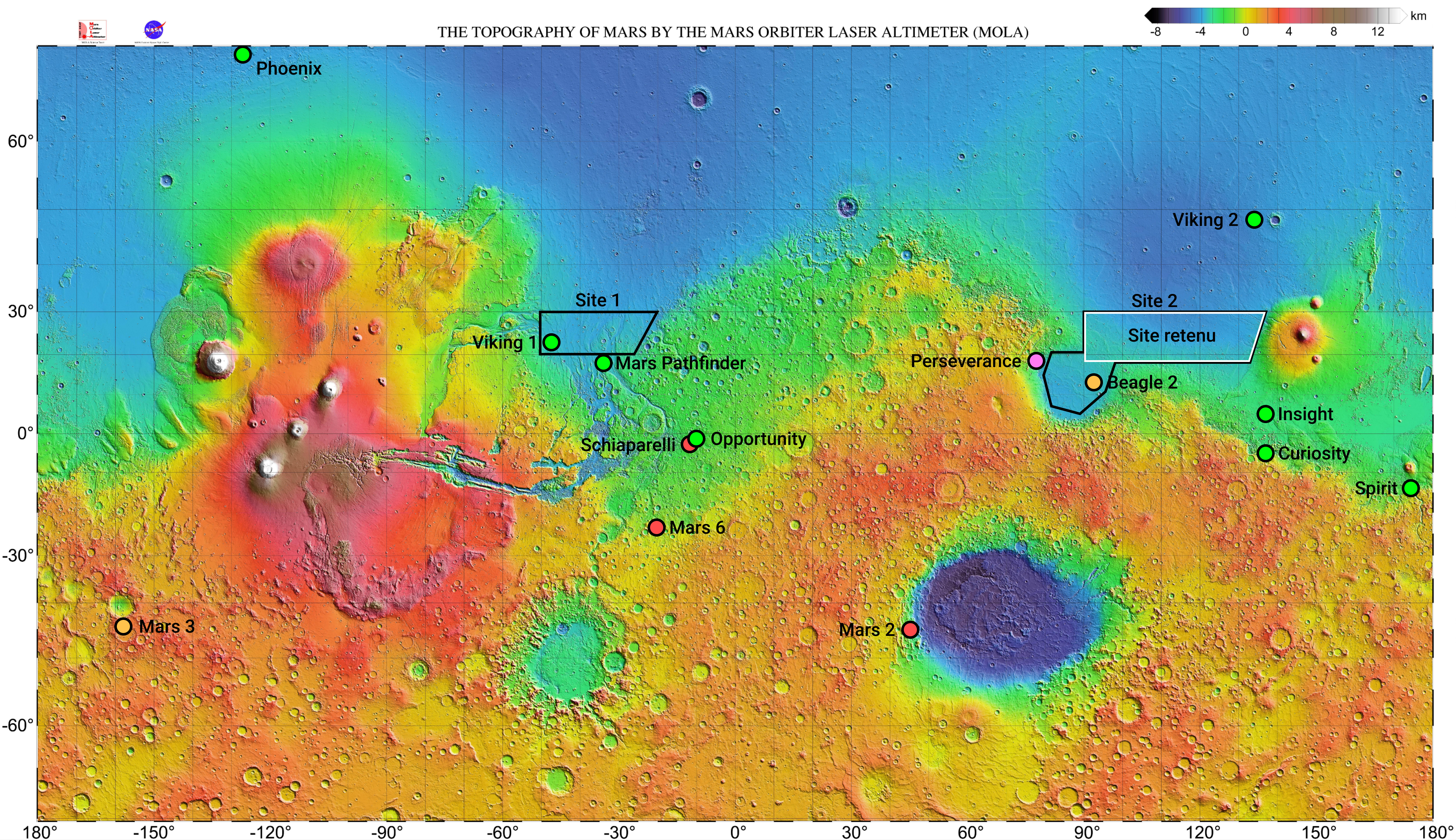 Une carte topologique de Mars avec indiqué les atterrissages ayant réussi (en vert), ayant échoué (en rouge), ceux où l'atterrissage a réussi mais la sonde a été perdu (en orange), et ceux à venir (en rose). En noir sont encadrés les deux sites étudiés pour l'atterrissage du rover de Tianwen-1. En blanc est encadré le site final retenu.